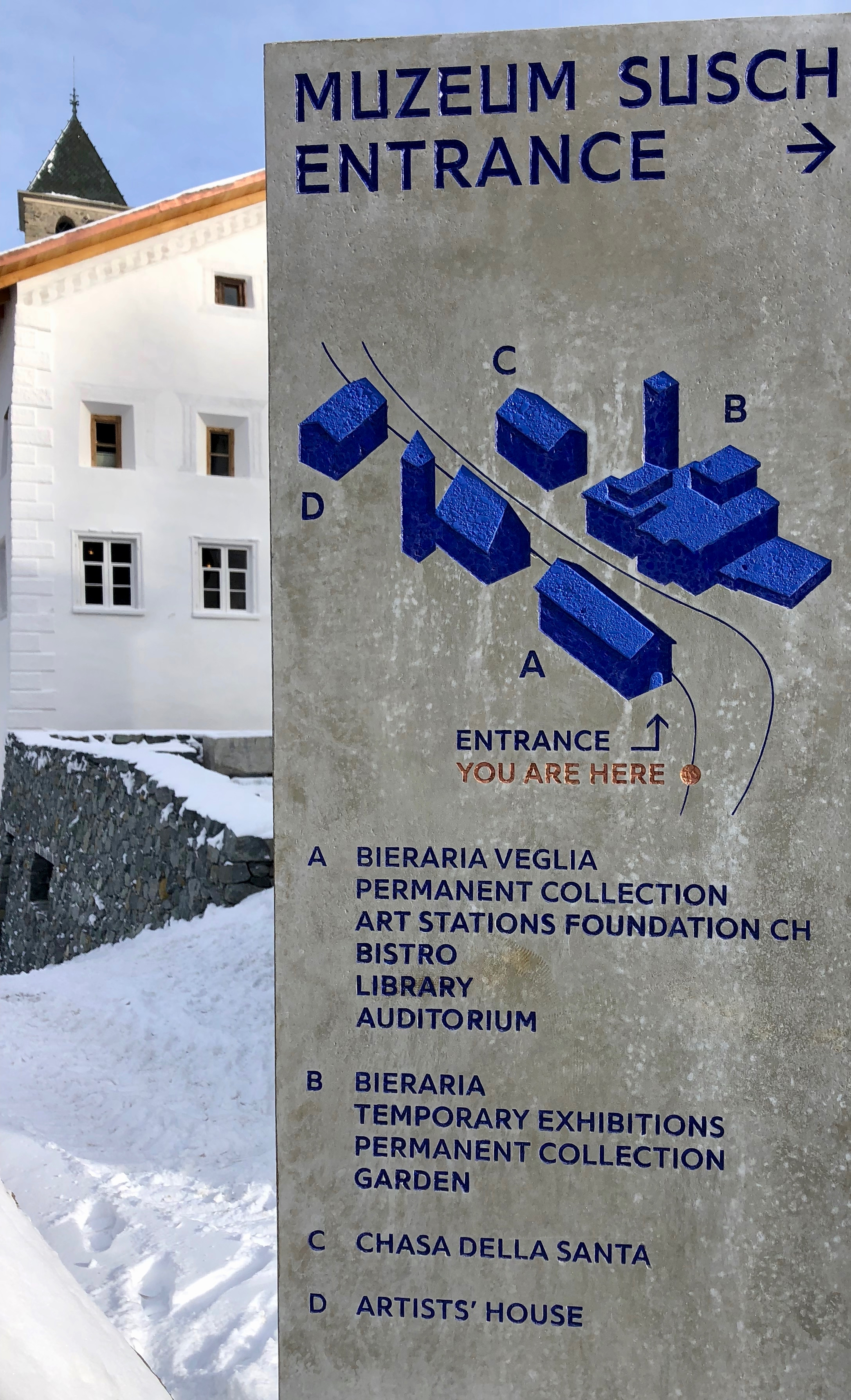 Muzeum Susch Lageplan